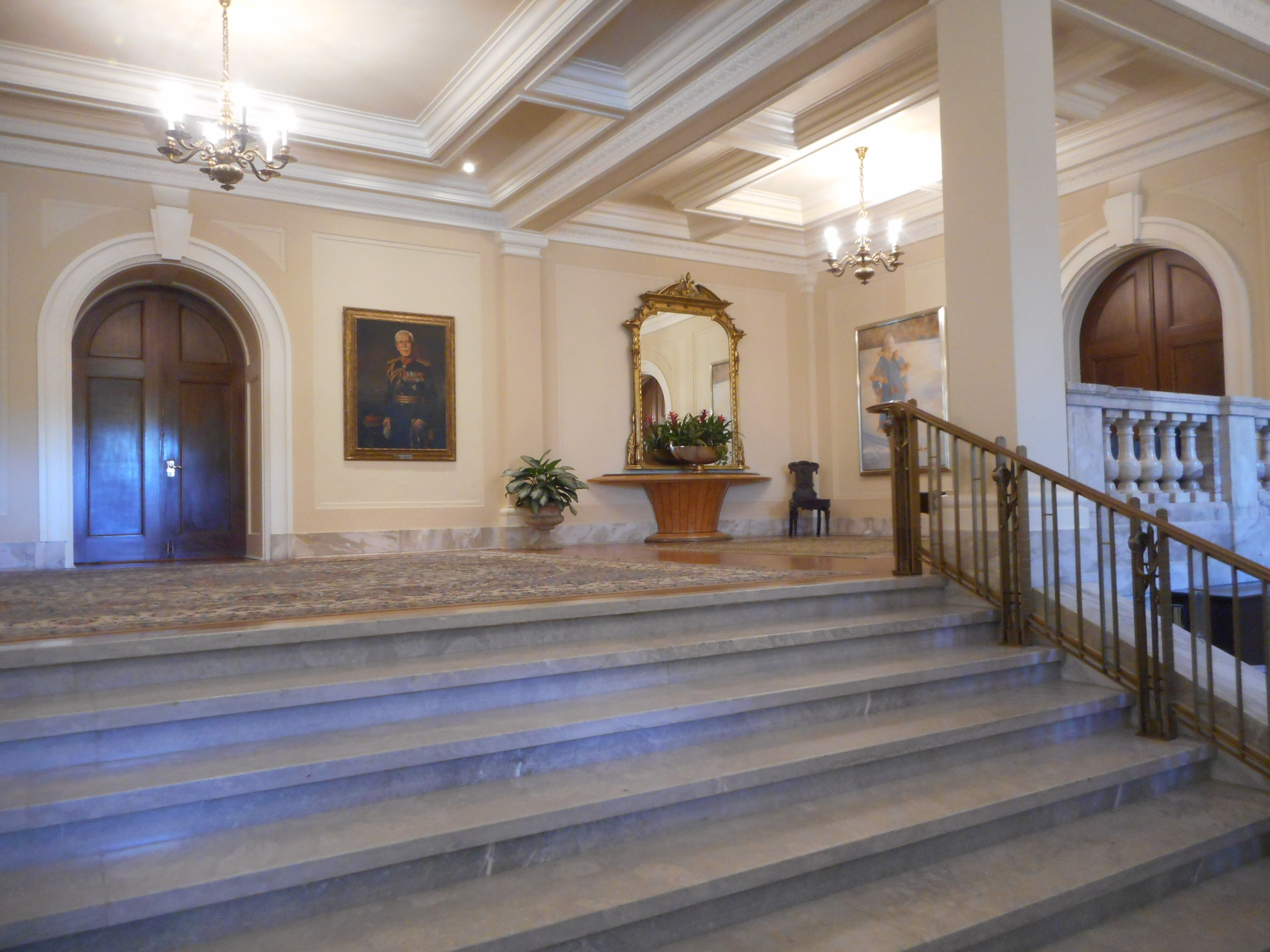 Rideau Hall, Ottawa